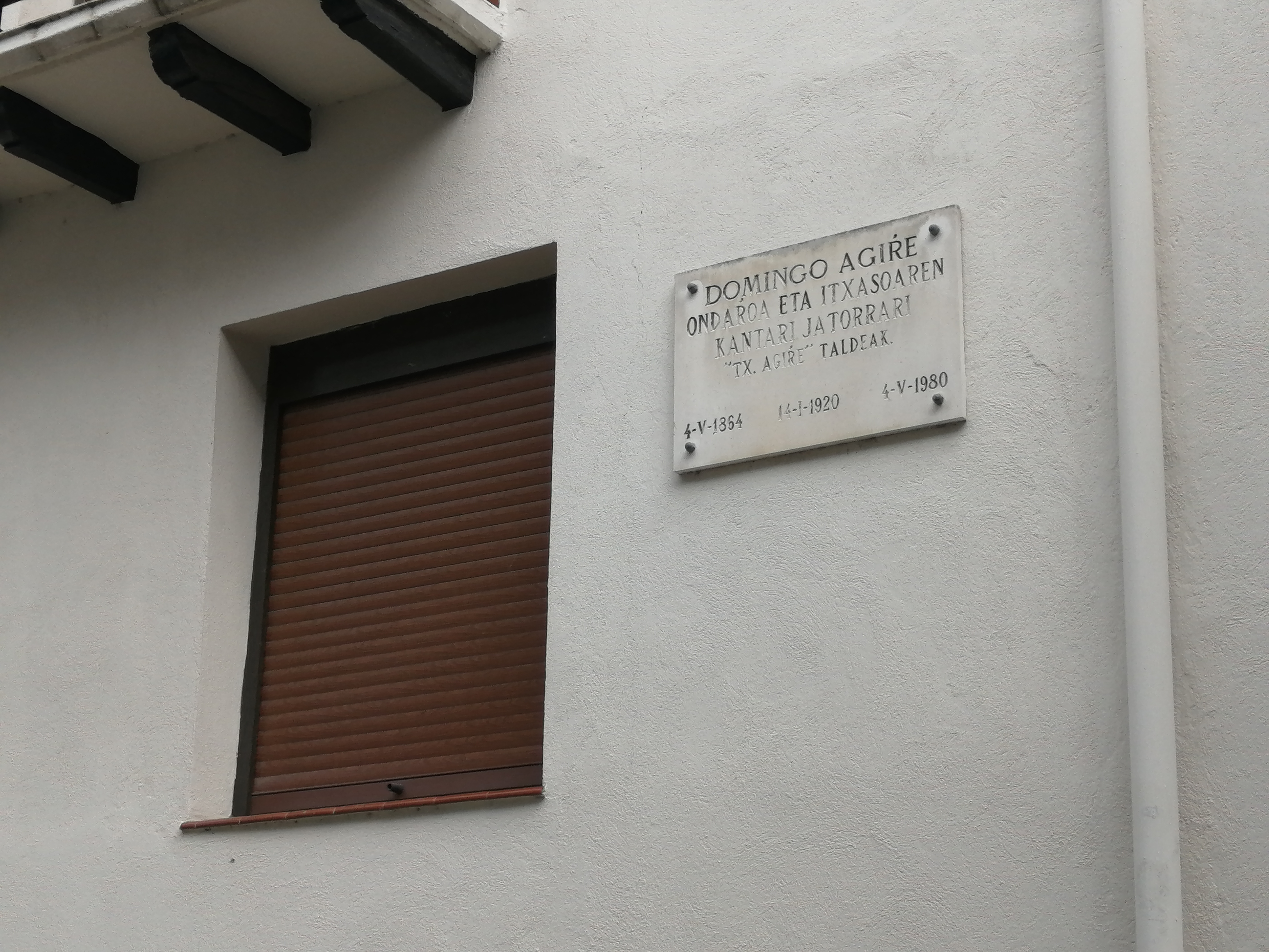 Txomin Agirre idazlea jaio zen etxeko plaka, Ondarroan